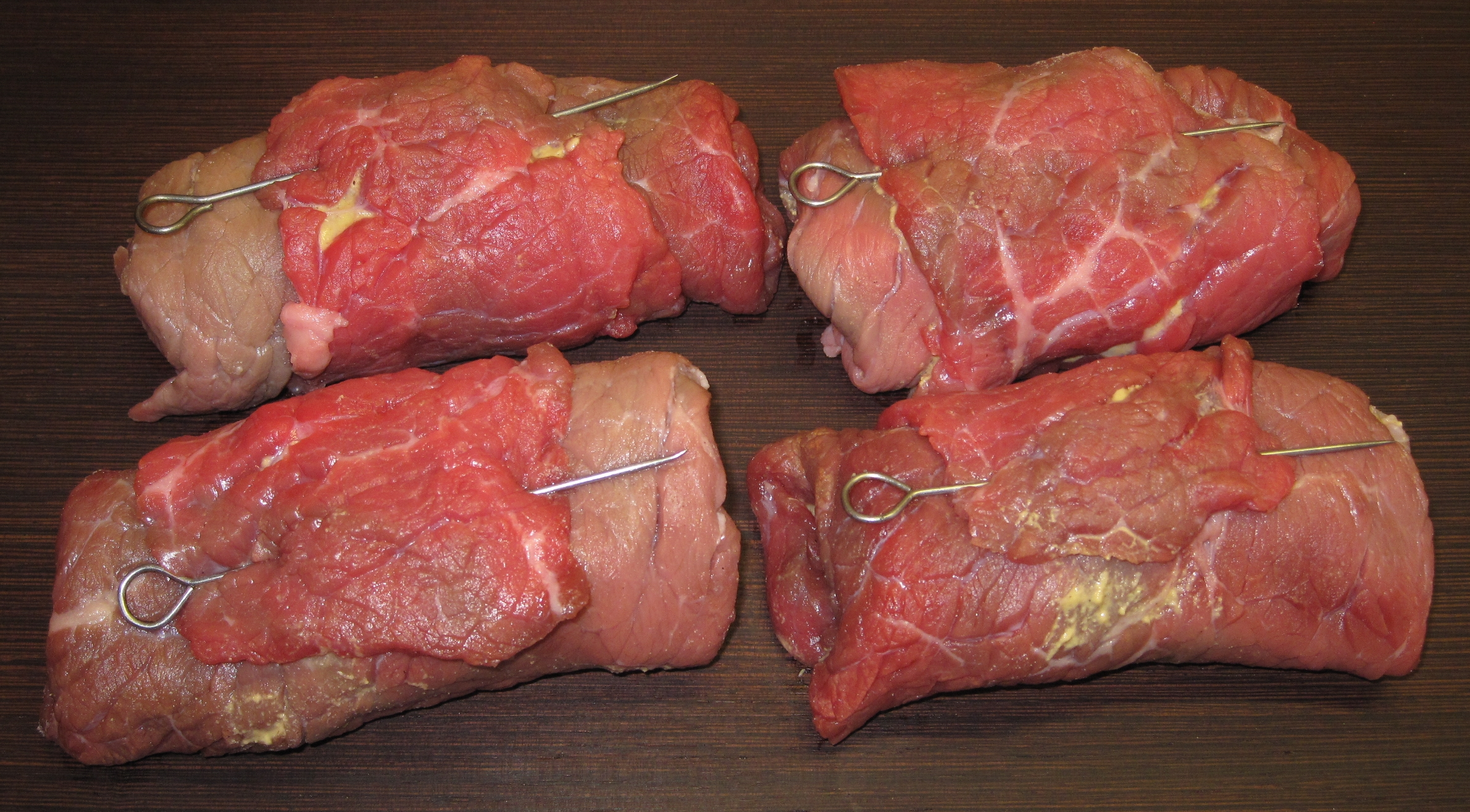 Rinderrouladen vor dem Anbraten; gewürzt mit Pfeffer, Salz und scharfem Senf; gefüllt mit Gurken, Zwiebeln und fettem Speck. Festgesteckt mit Rouladennadeln.